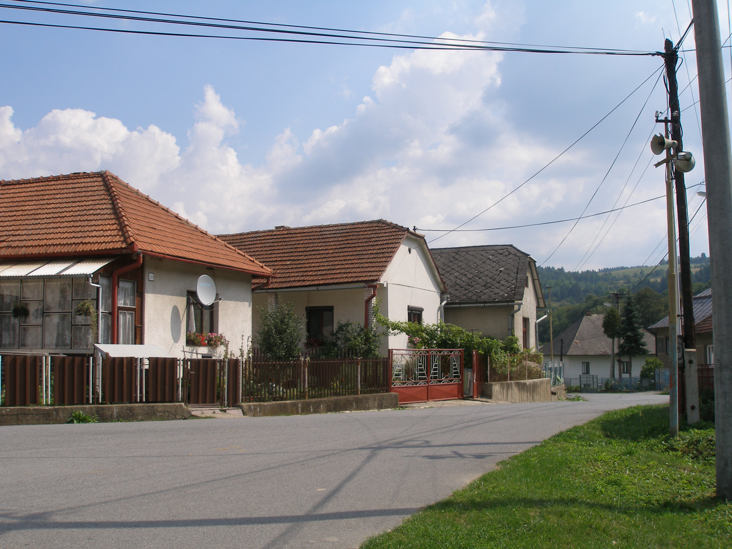 Šarišská obec Chminianske Jakubovany